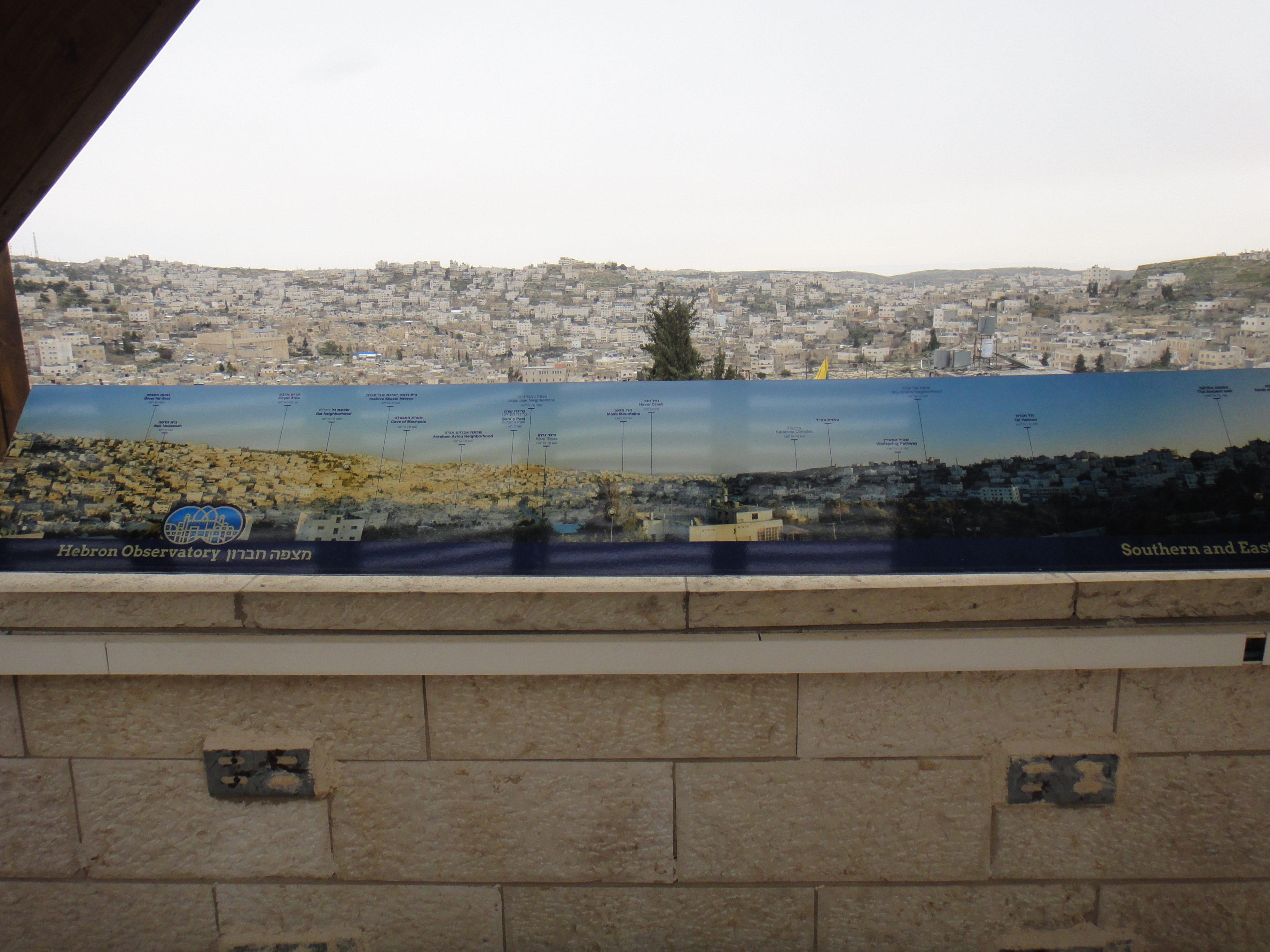 תמונה יפה משטח H1 בחברון